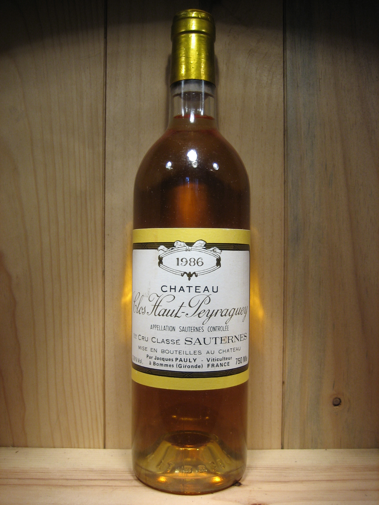 Photographiée par drmanu le 14 janvier 2006.